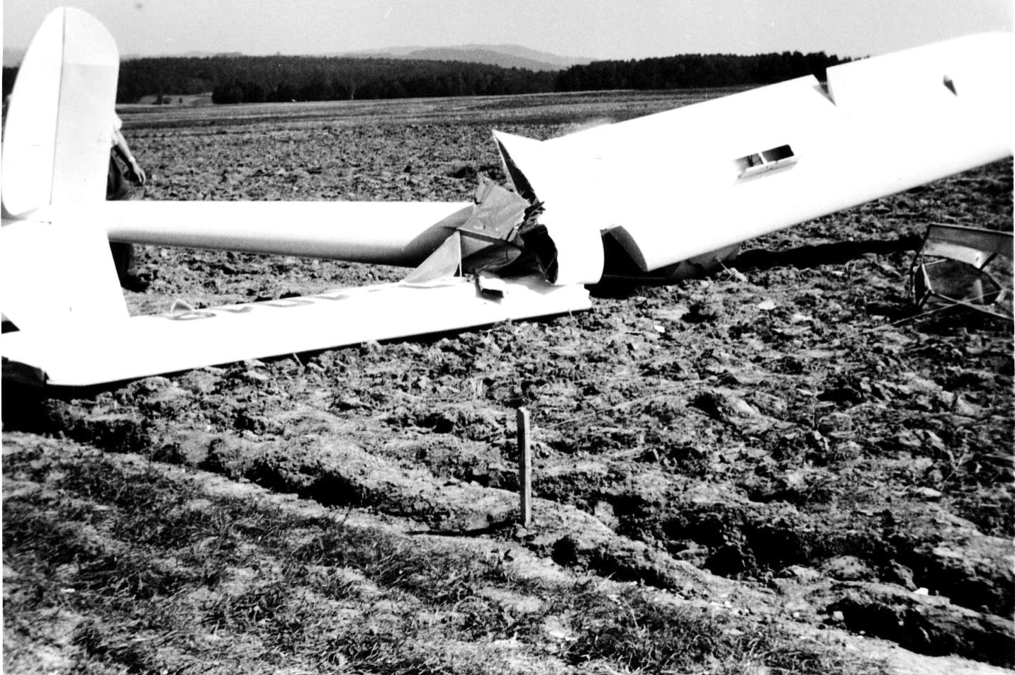 Der abgestürtzte und zerstörte Segelflieger "Stadt_Burgkunstadt" der "Segelfluggruppe Kordigast" auf der Kaltenreuther Höhe.